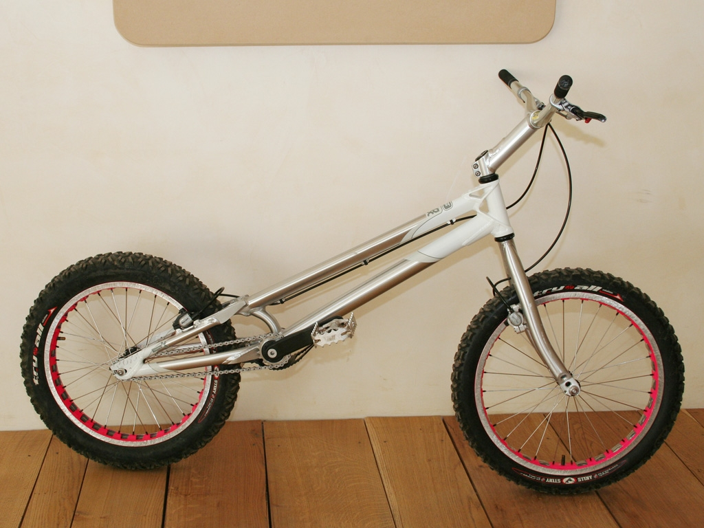 Bicicleta de trial 20inch.